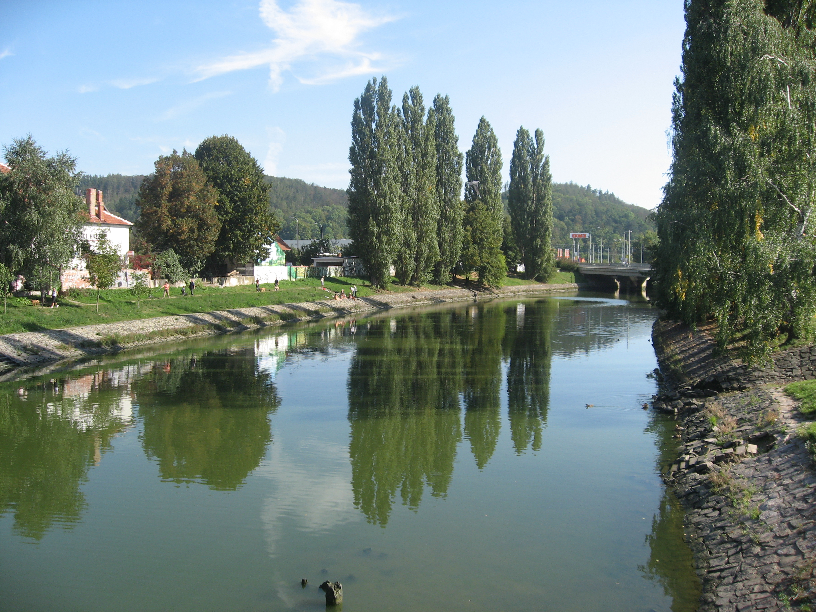 Svratka u Zoologické zahrady Brno